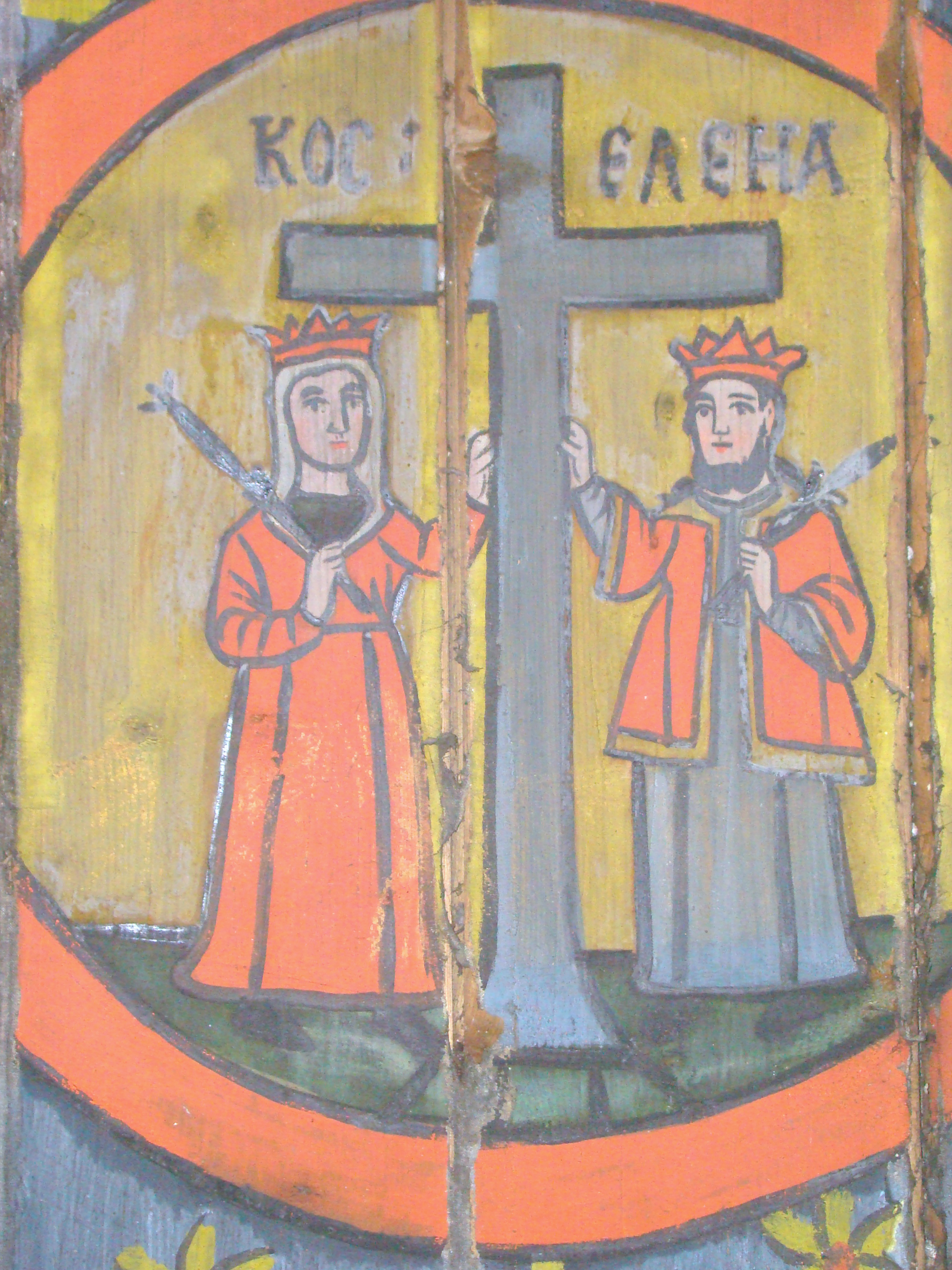 Biserica de lemn „Sf.Dumitru” din Păușa, județul Bihor